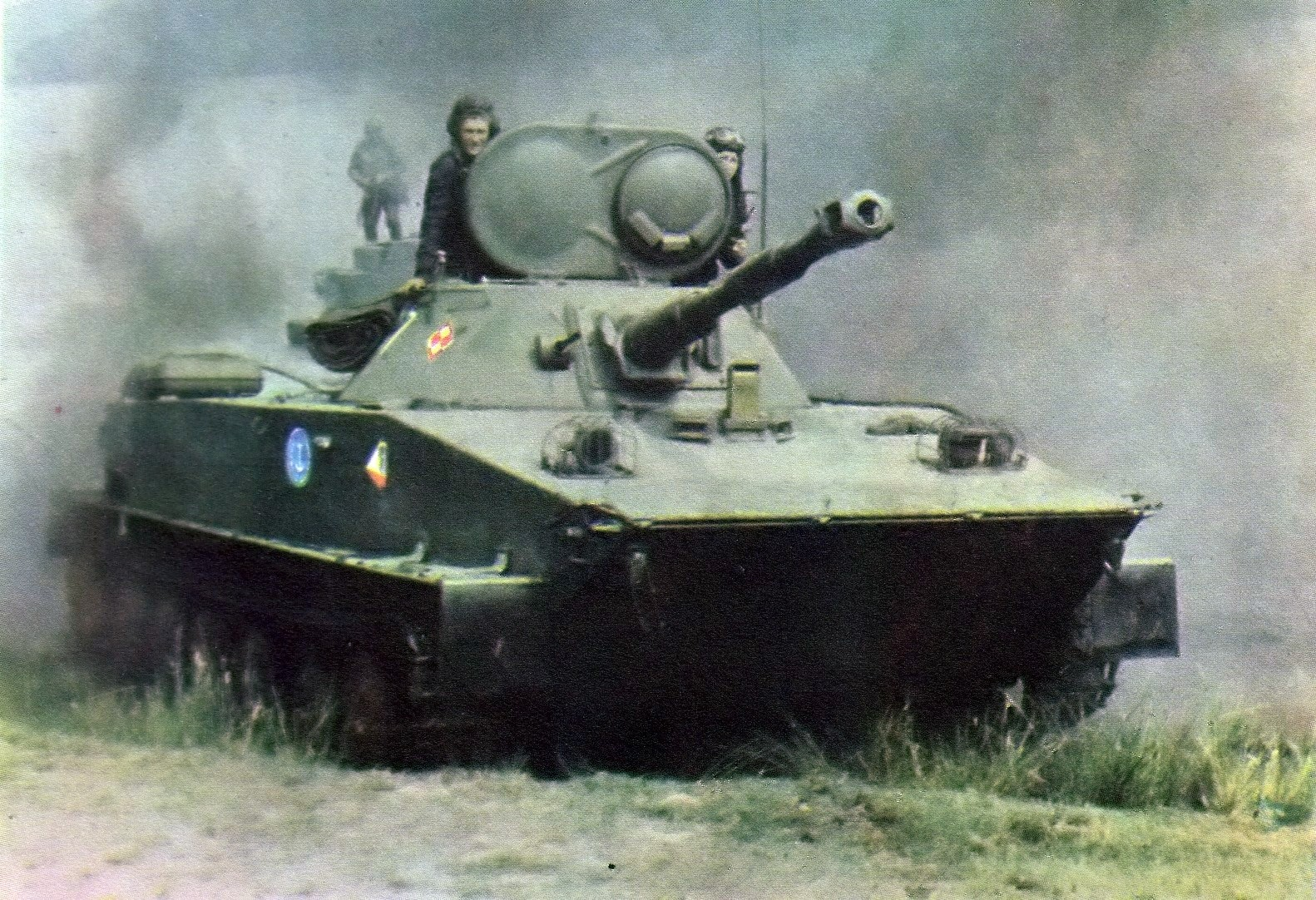 PT-76 7. Dywizji Obrony Wybrzeża